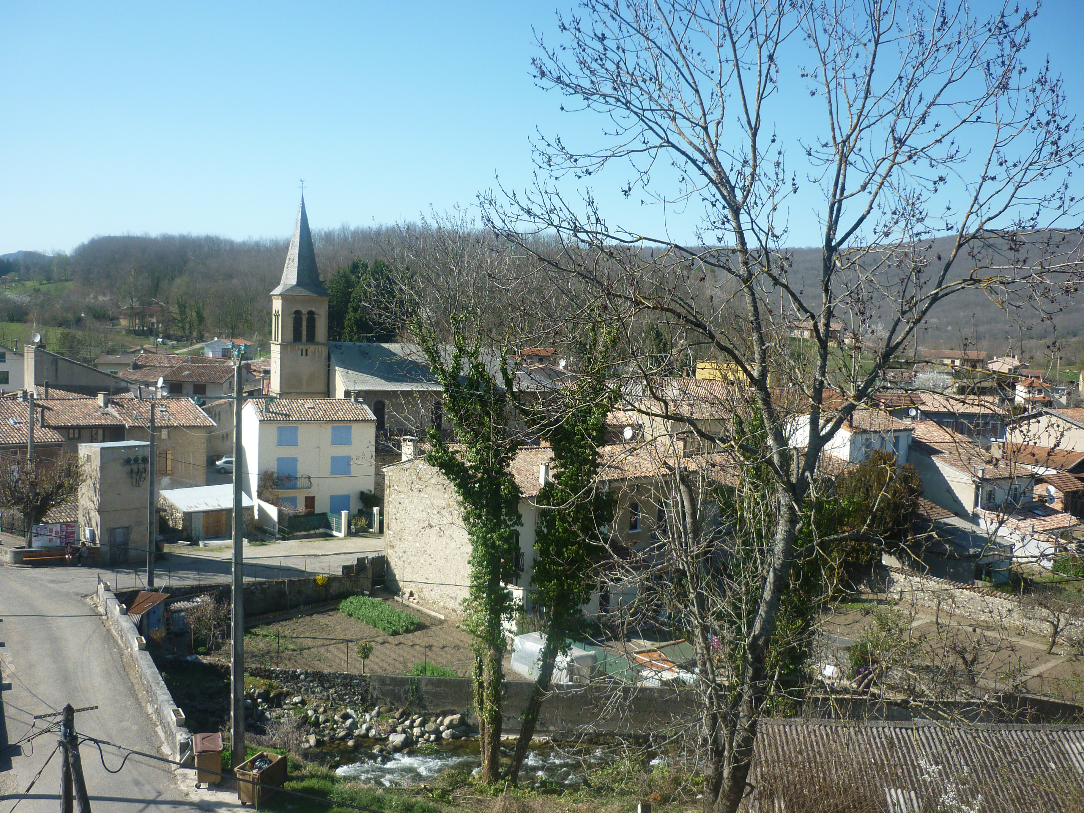 Vue du centre du village de Villeneuve-d'Olmes prise depuis la route de Bénaix, au premier plan